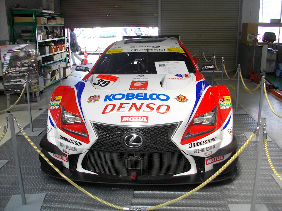 DENSO KOBELCO SARD RC F（2016年モデル）撮影：千葉トヨペット本社（イベントでの展示時）